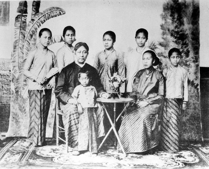 Repro Negatif. Potret studio Raden Ajeng Kartini dengan orangtuanya, saudara perempuan, dan saudara laki-lakinya.